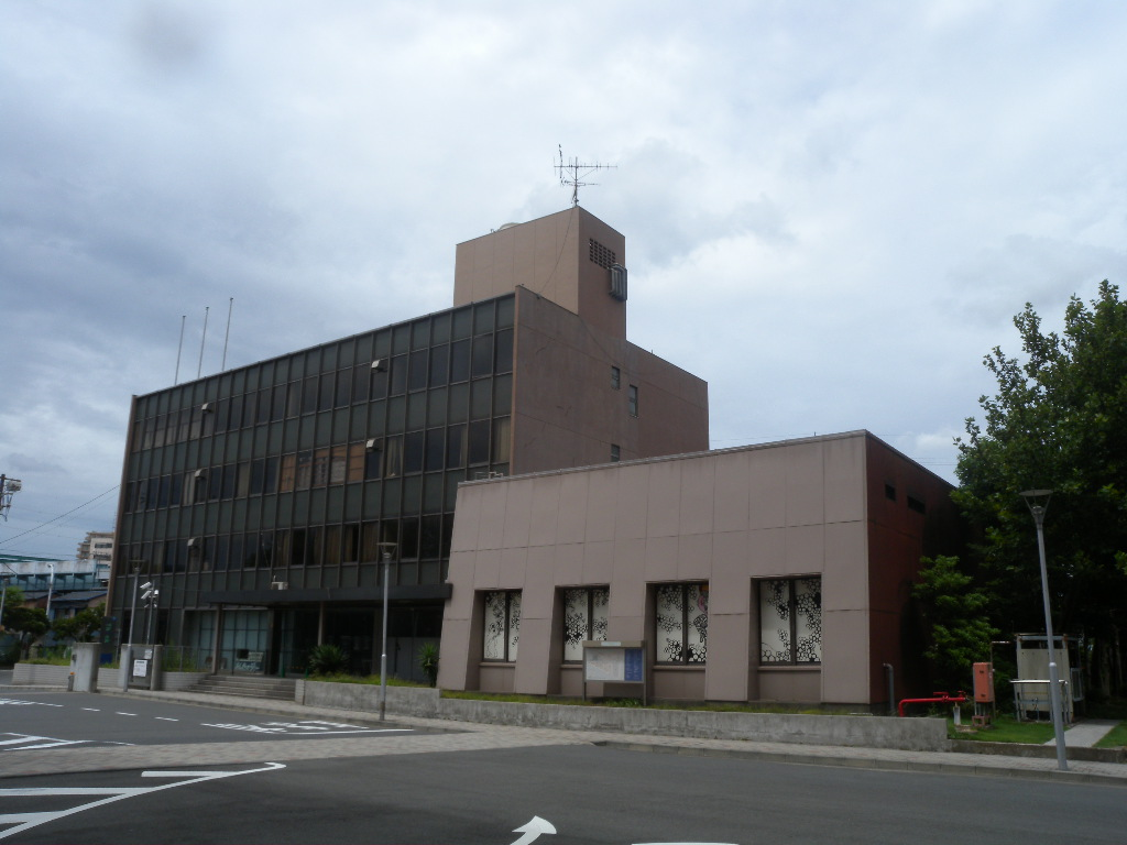 THINK・川崎5スタジオ